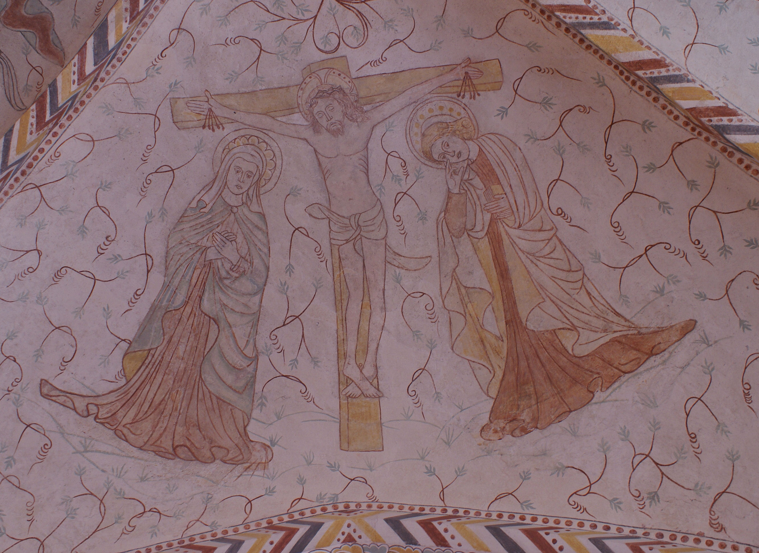 Kalkmaleri i Ballerup Kirke, Jesu dåb ved Johannes Døber